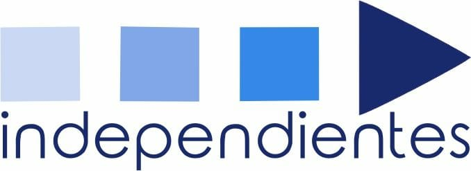 Logo IxH